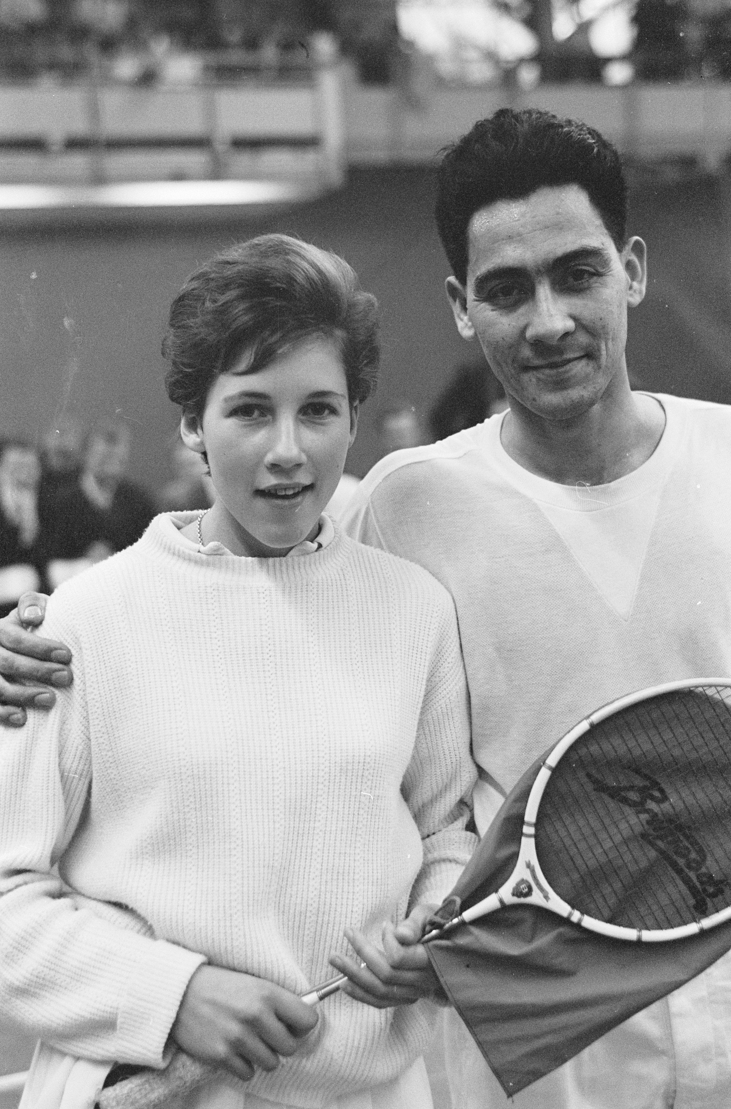 Collectie / Archief : Fotocollectie Anefo Reportage / Serie : Nationale Badmintonkampioenschappen te Eindhoven Beschrijving : W.A. Seth Paul en [...] Annotatie : W.A. Seth Paul is ook bekend als Pim Seth Paul Datum : 10 december 1961 Locatie : Eindhoven, Noord-Brabant Trefwoorden : badminton, kampioenschappen Persoonsnaam : Seth Paul, Pim Fotograaf : Harry Pot / Anefo Auteursrechthebbende : Nationaal Archief Materiaalsoort : Negatief (zwart/wit) Nummer archiefinventaris : bekijk toegang 2.24.01.05 Bestanddeelnummer : 913-2749